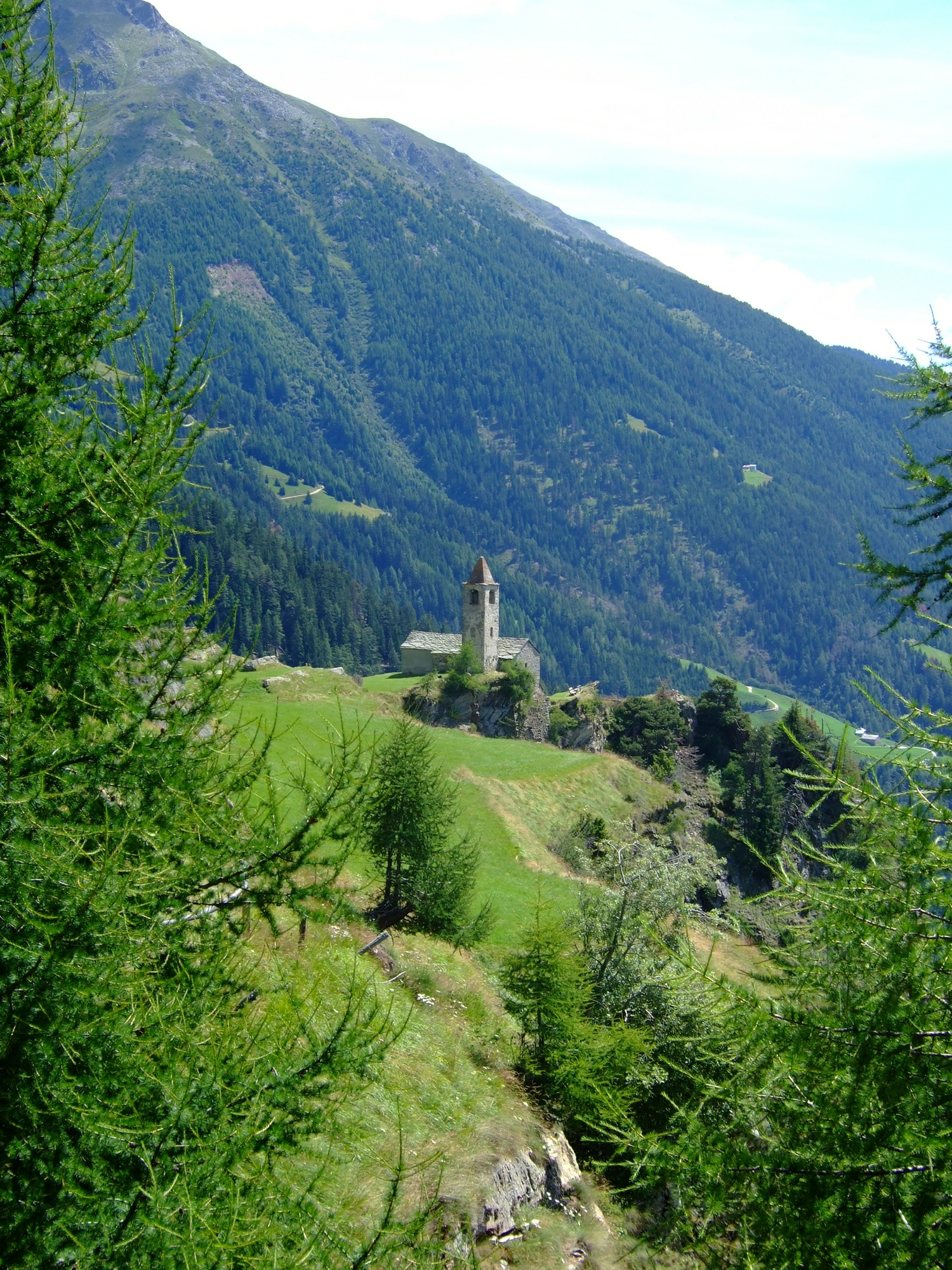 Die Kirche San Romerio in der Gemeinde Brusio im Valposchiavo, Schweiz